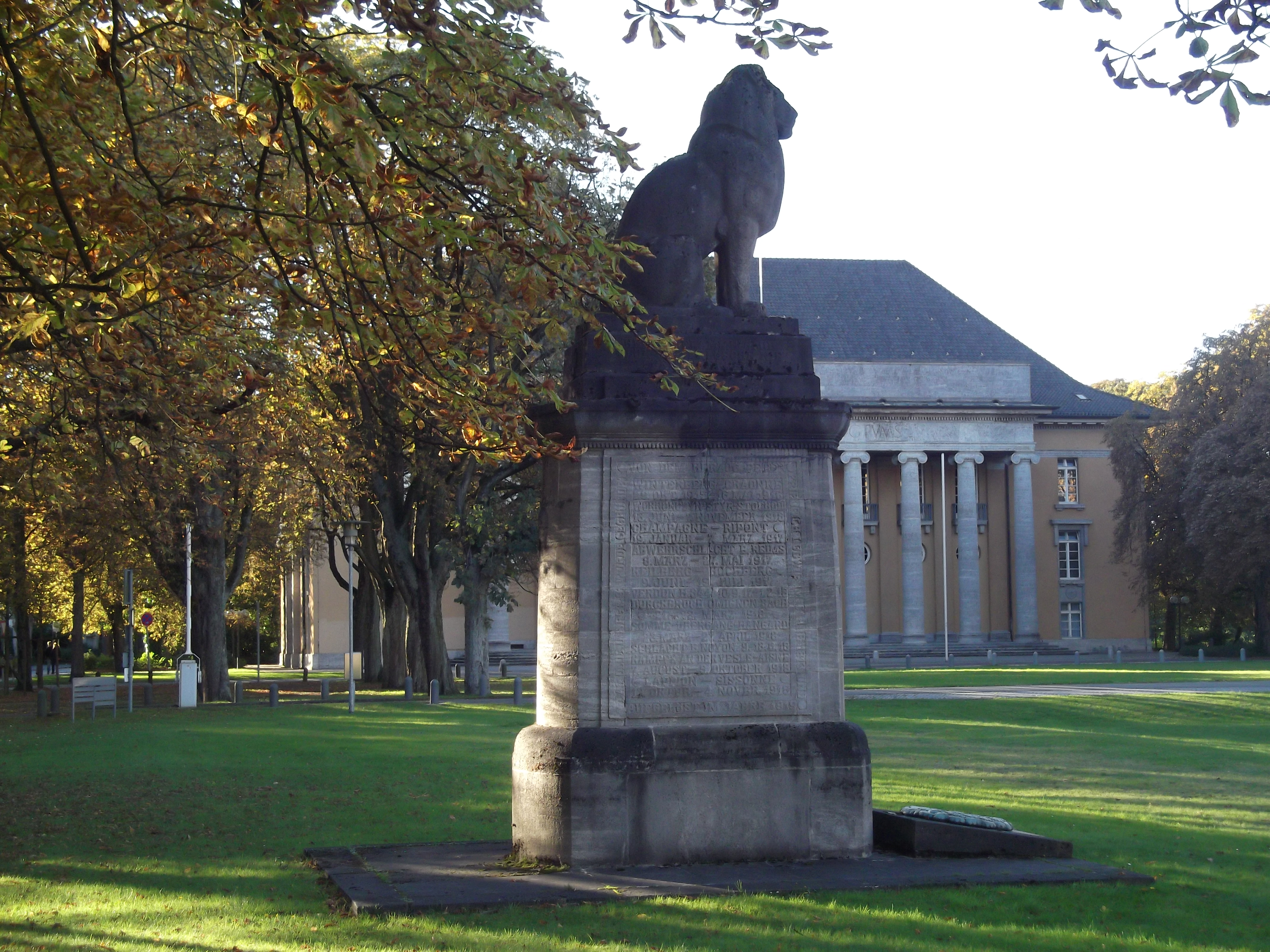 Entworfen von Hugo Lederer, eingeweiht am 18. September 1921 in Oldenburg (Oldenburg). Gewidmet den Gefallenen und Vermissten des OIR 91 des Ersten Weltkriegs. Standort von 1921 bis Mai 1960 Oldenburg, Schlossplatz. Seit Ende Mai 1960 am heutigen Standort Oldenburg, Theodor-Tantzen-Platz. Material: Kalkstein. Im Hintergrund der ehemalige Landtag des Großherzogtums bzw. Freistaats Oldenburg.